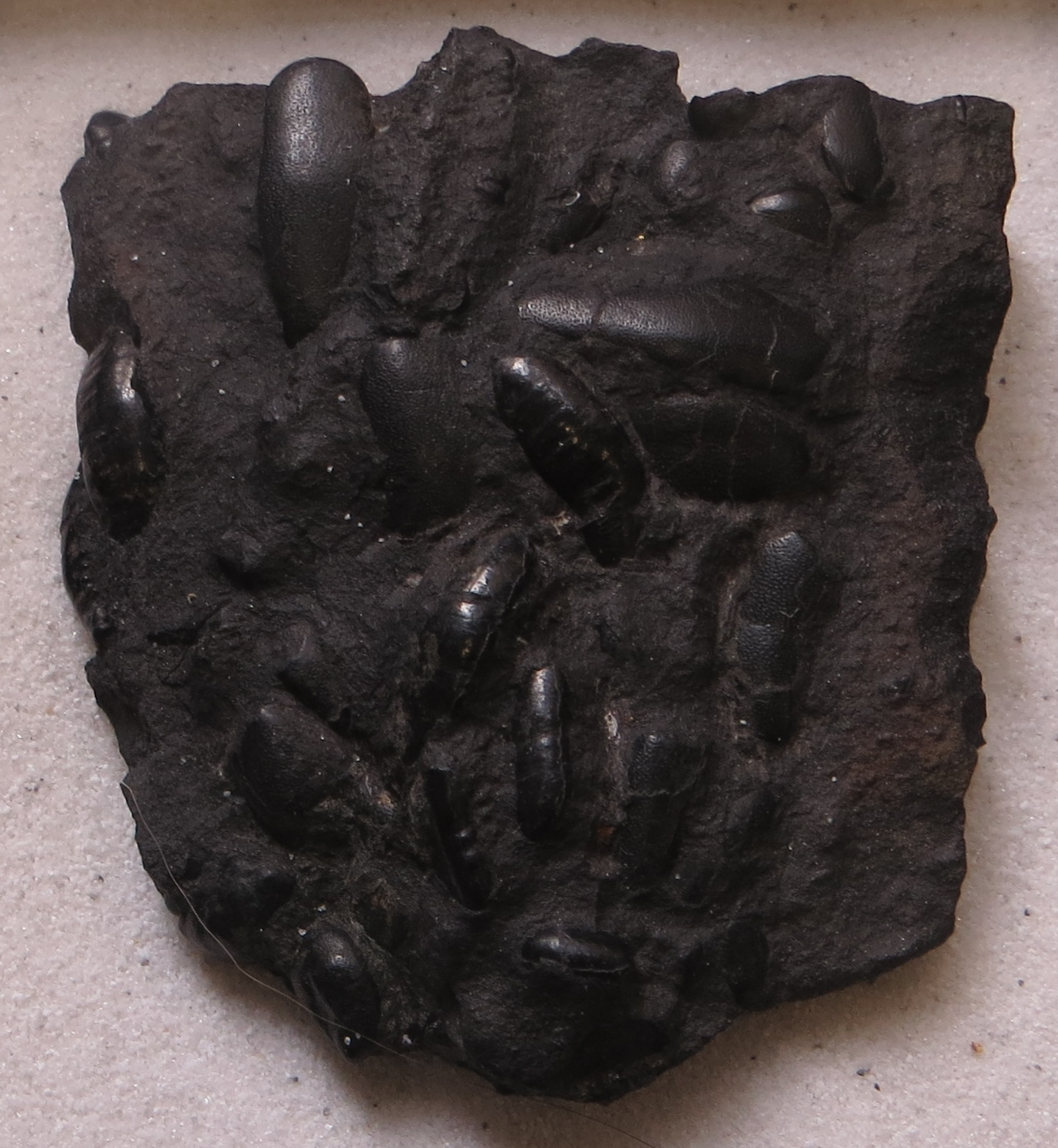 Fossil of Wodnika - Took the picture at Natural History Museum, Bonn University